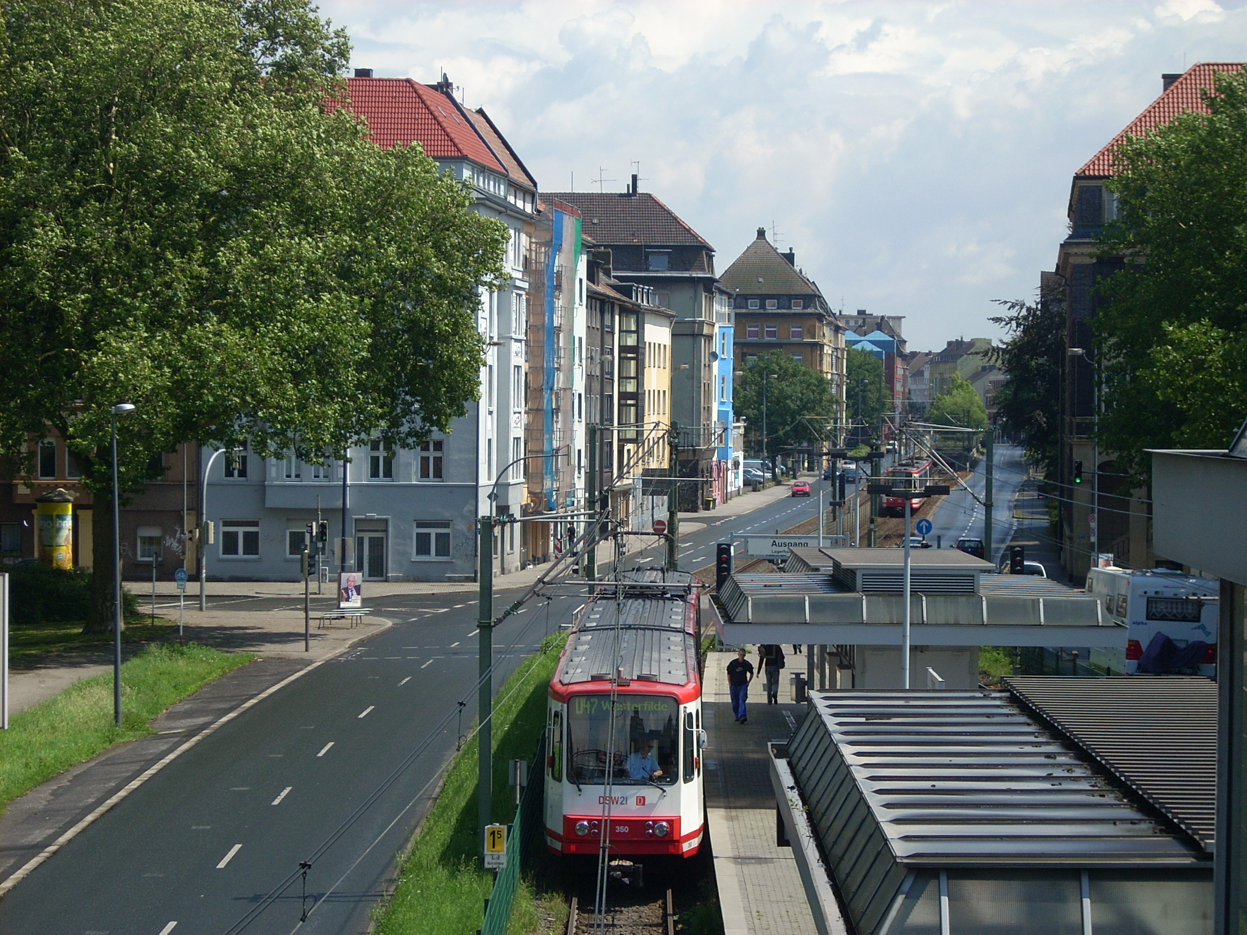 Stadtbahn Dortmund